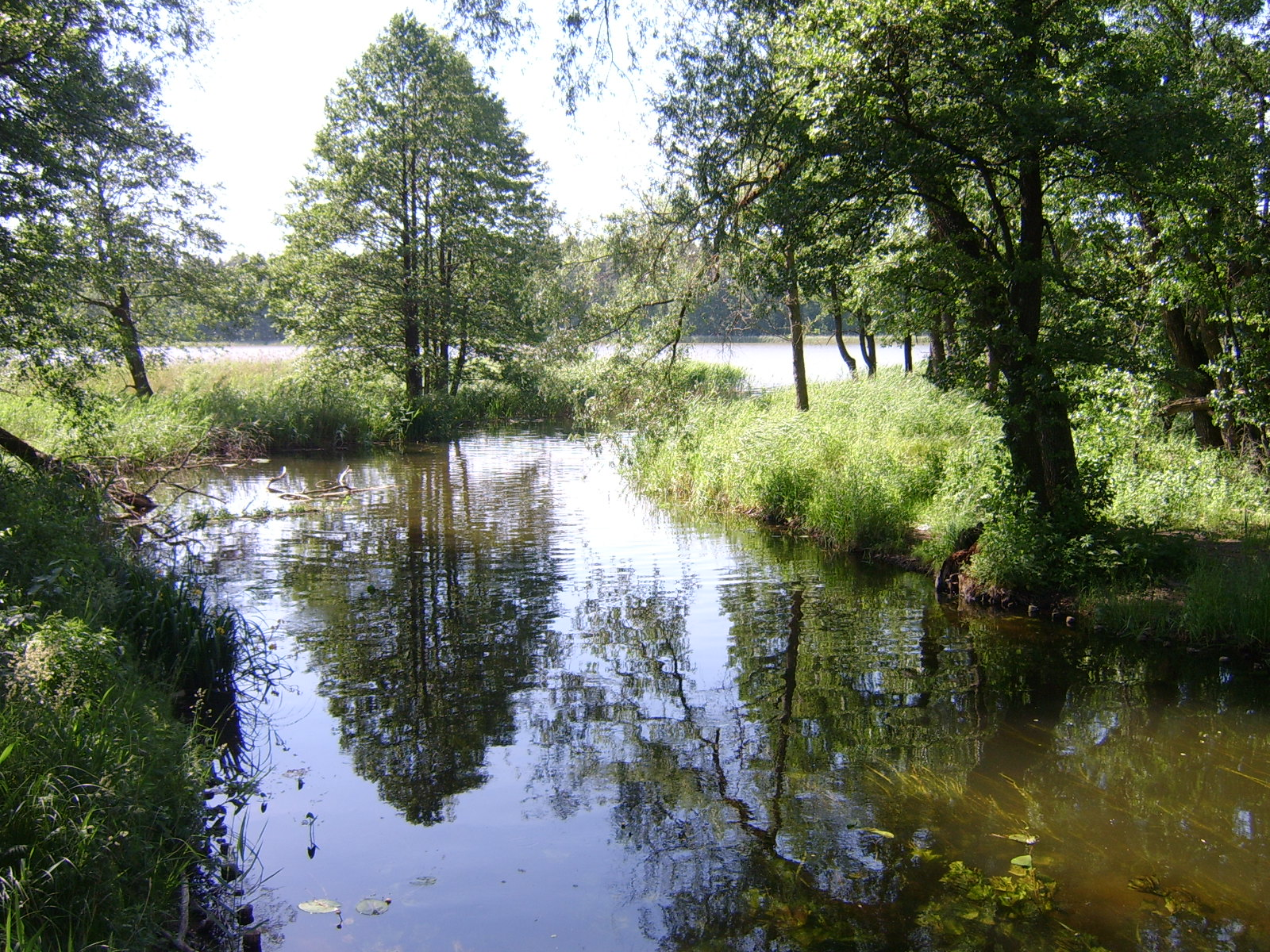 Orzysz wpływająca do Tyrkła